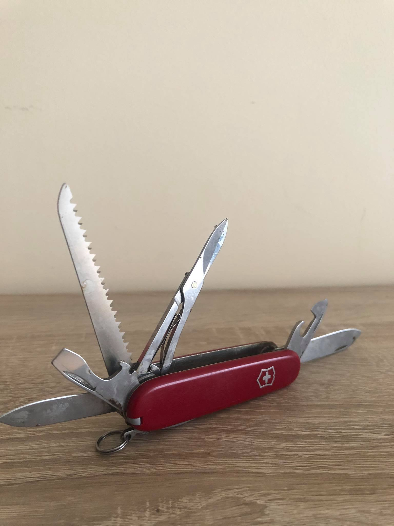 See on nuga 2